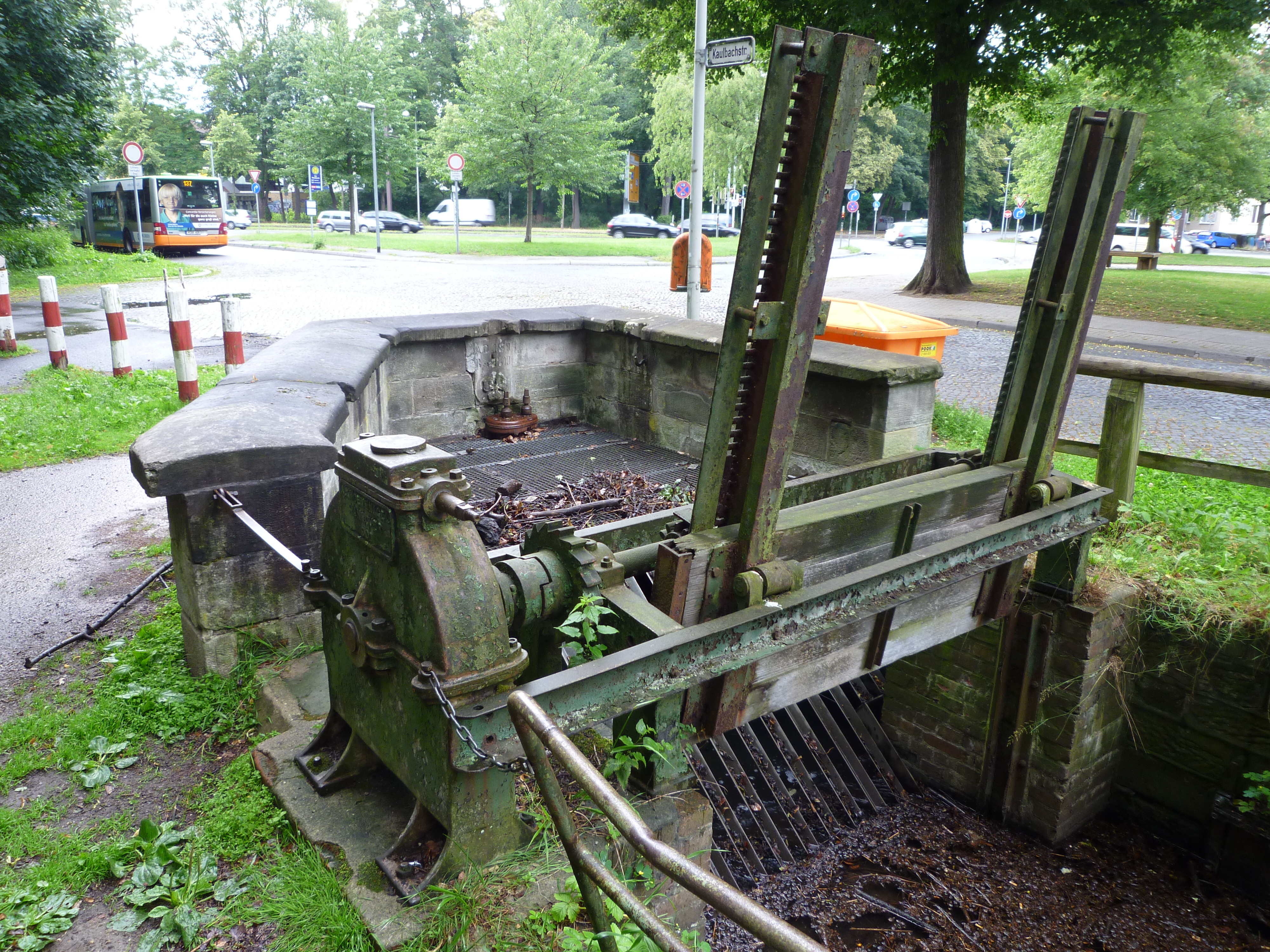 Hannover, Eilenriede, Kaulbachstraße Ecke Am Pferdeturm: Das Sperrwerk am Wolfsgraben stammt von der Maschinenbau-Firma von Albert Knoevenagel und ist datiert 1907, dem Todesjahr des Firmengründers. Die Einfassung der Unterführung des Grabens trägt neben dem Kleeblatt (als Wahrzeichen der Stadt Hannover) die Angaben "Erbaut 1879, renoviert 1900. Vor dem Sperrwerk findet sich in der Haustein-Mauer eine kleinere metallene Absperrung mit den Buchstaben in einem hochkanten Oval